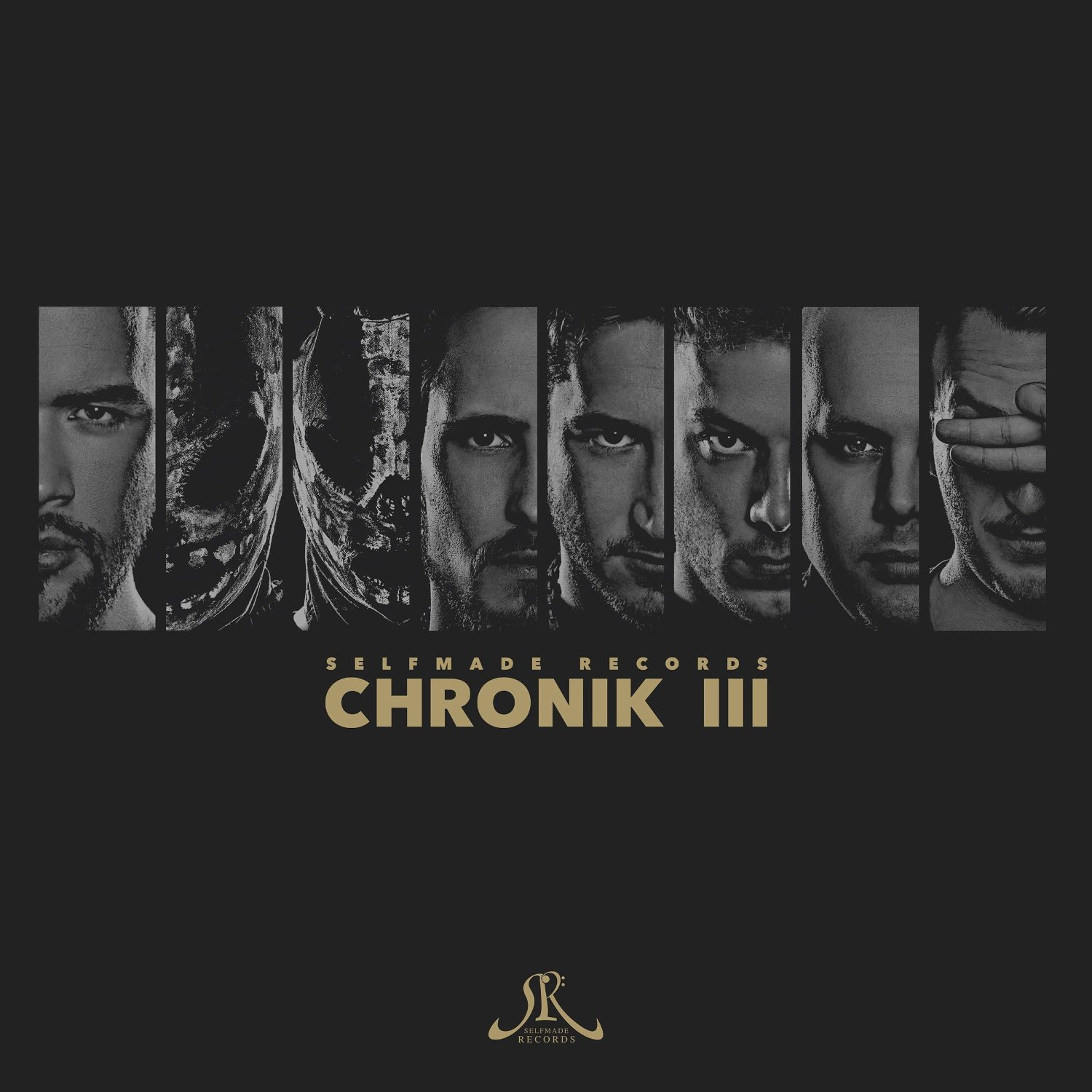 Cover des Samplers „Chronik 3“